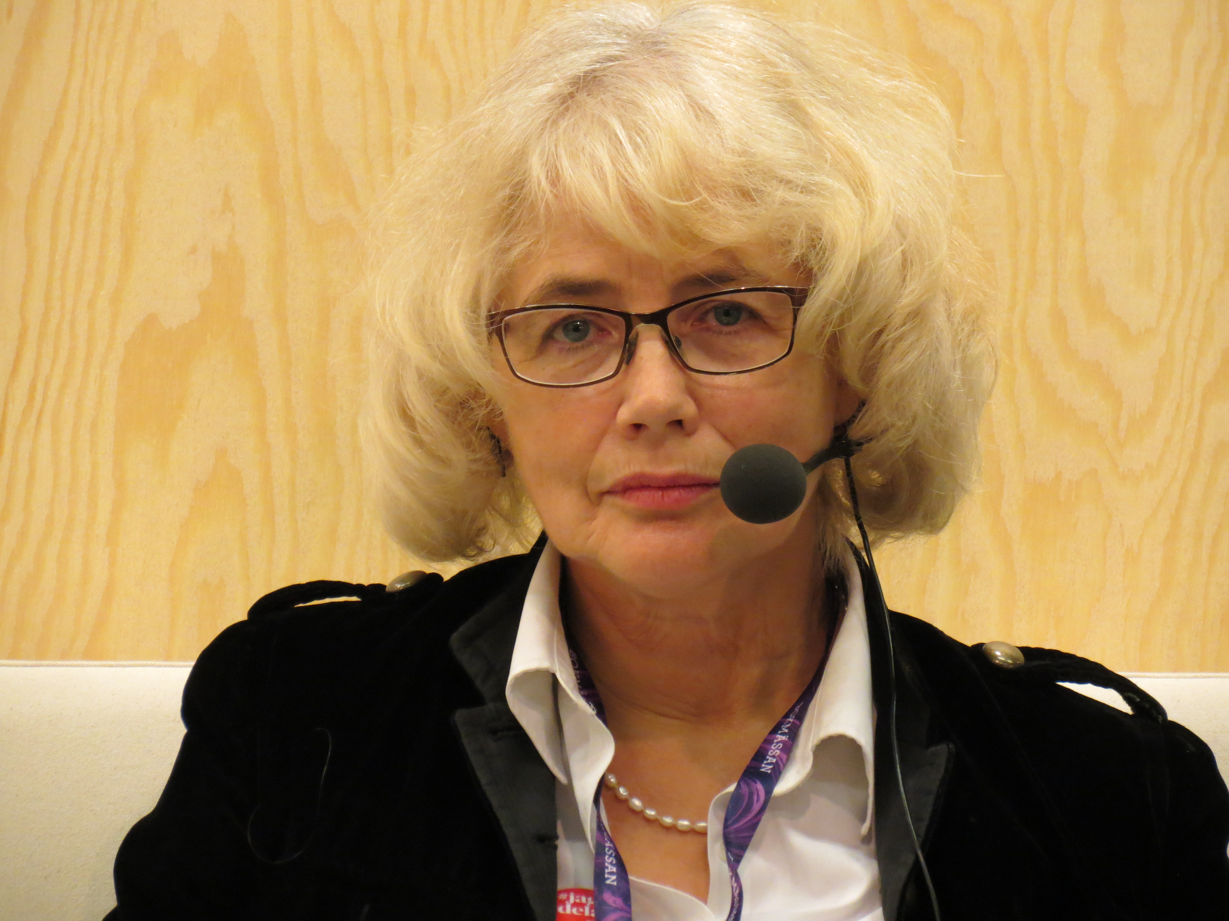 Marika Lagercrantz samtalar om kulturpolitik med kulturministern på Bokmässan i Göteborg 2015.